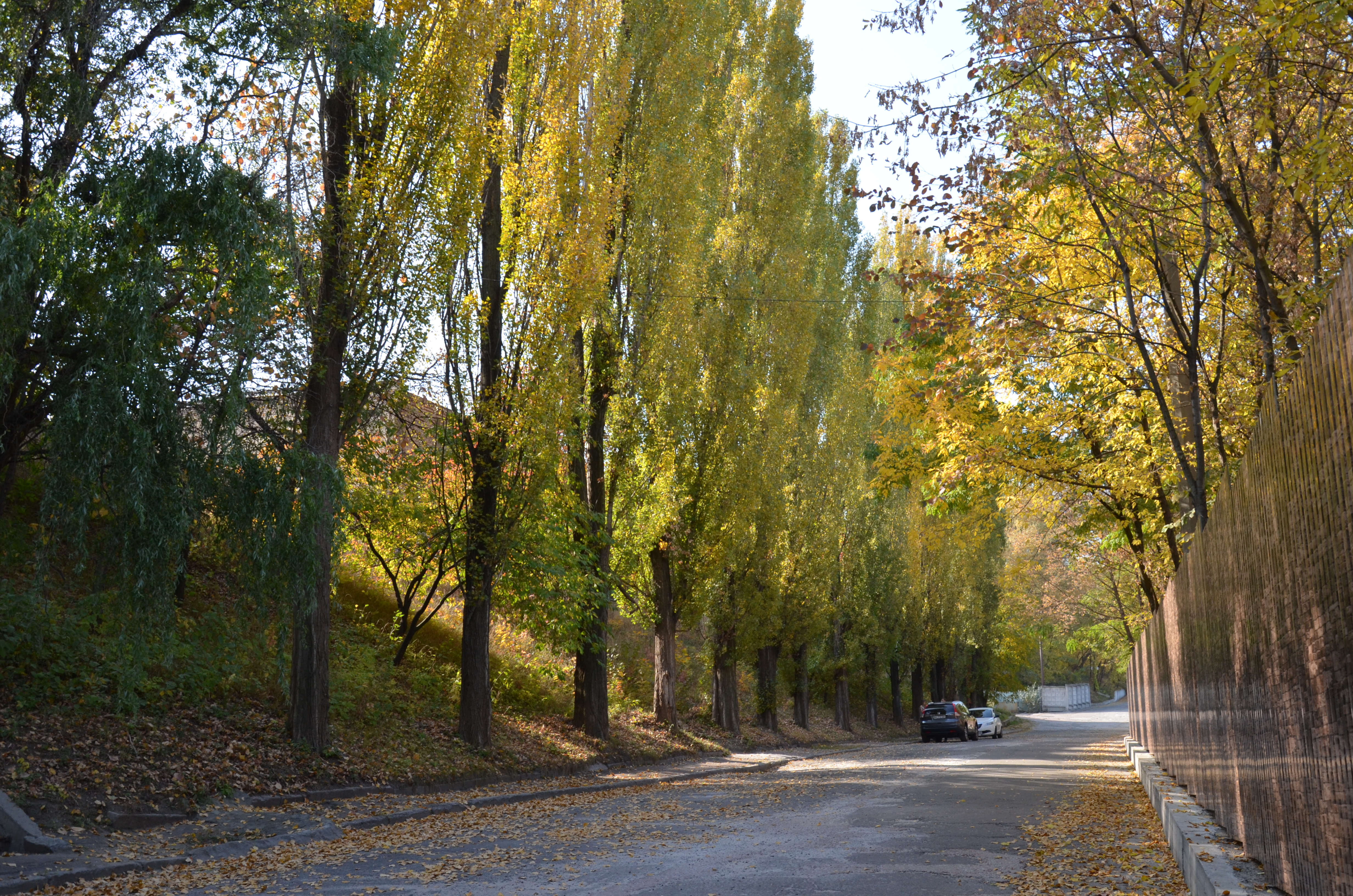 Кирилівська стоянка первісних людей епохи палеоліту, Київ, Фрунзе вул., 59-61